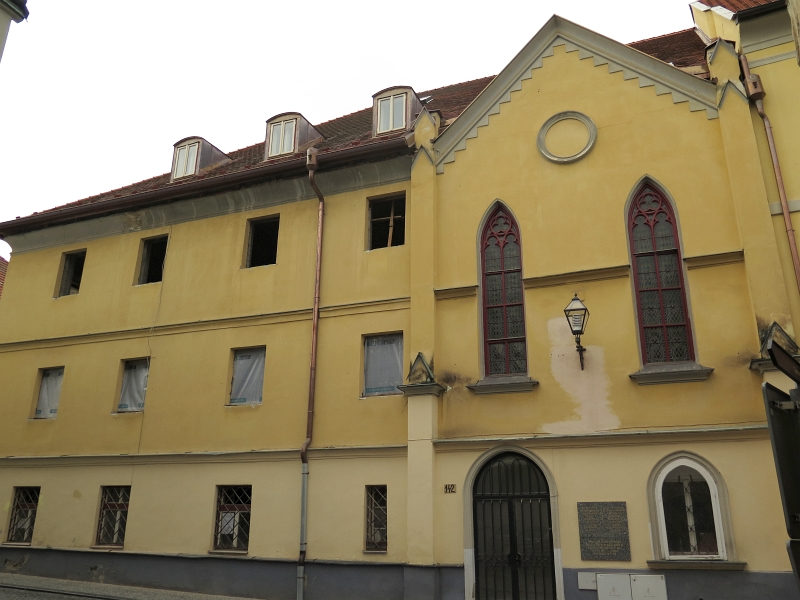 Dům čp. 142, Horní 142, Prachatice I, Prachatice.